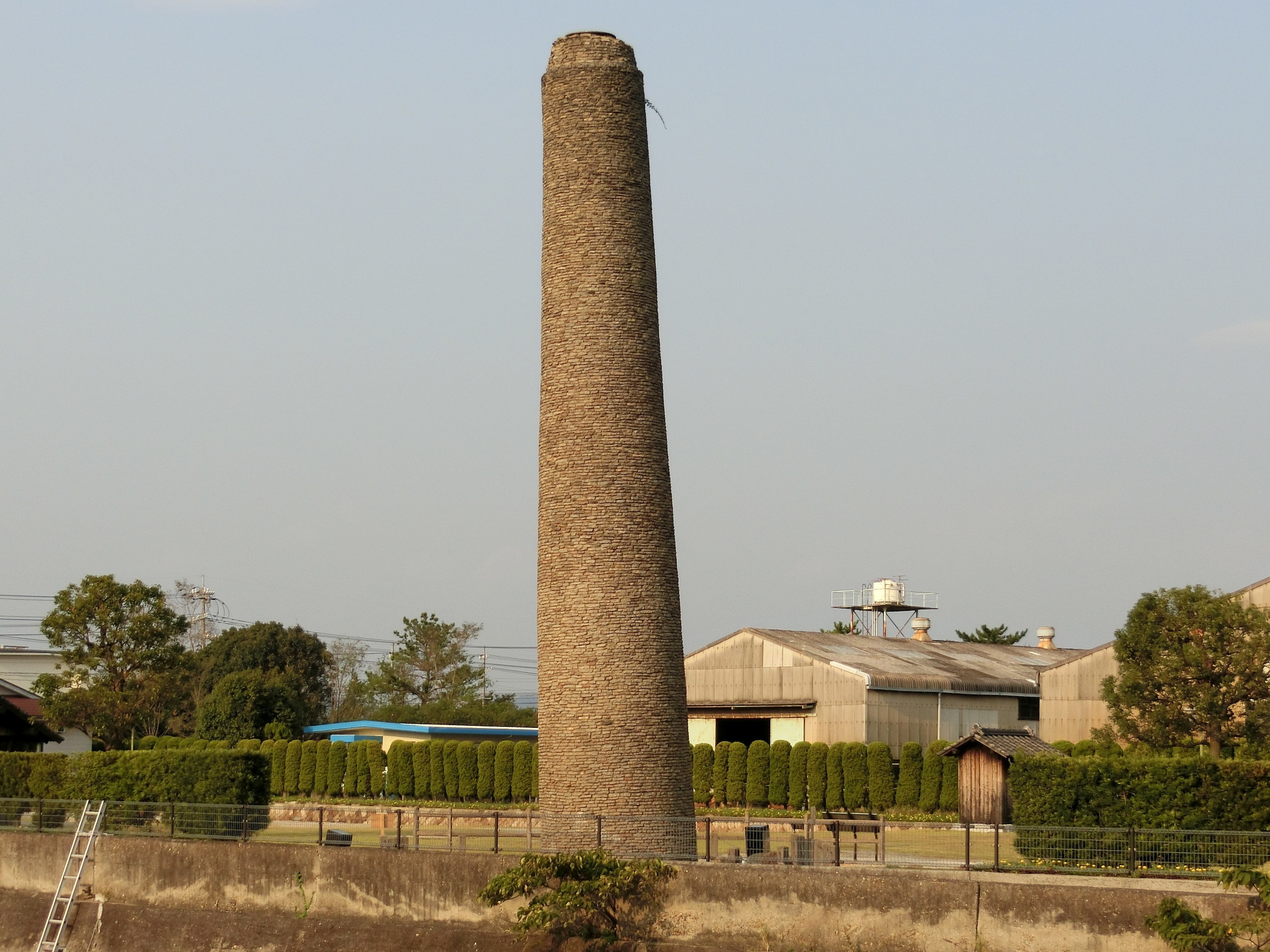 三田尻塩田記念産業公園の三田尻塩田旧越中屋釜屋煙突（防府市）。